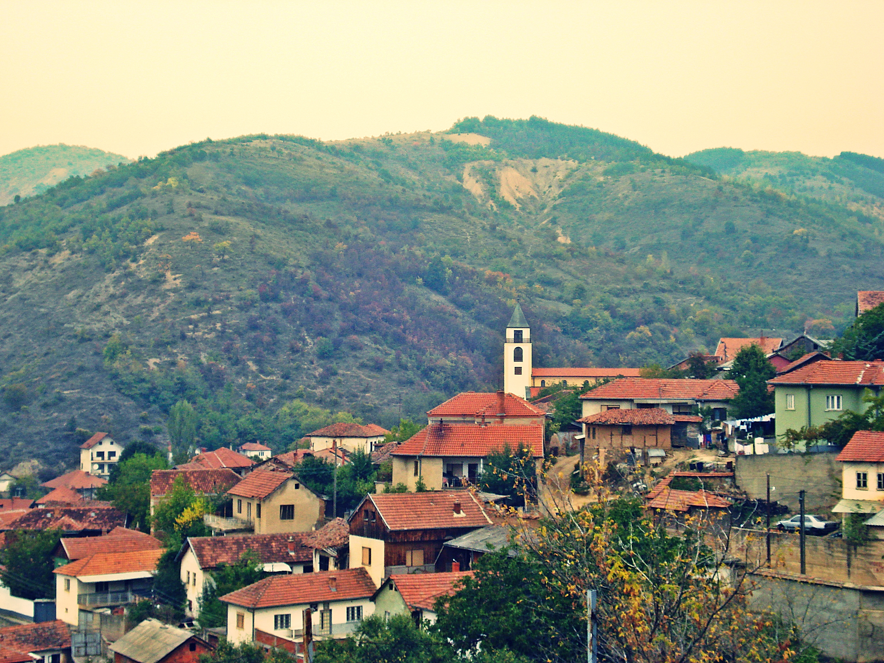 Fshati Janjevë që fsheh brenda tij një kulturë të lashtë